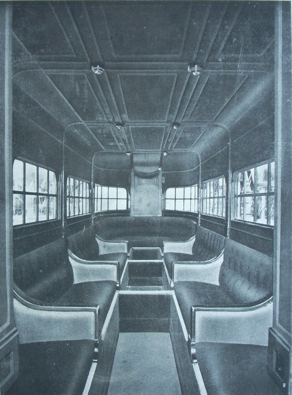 Interno della cabina del veivolo 600 900 HP, 1916 ca (Archivio famiglia Caproni Roma)